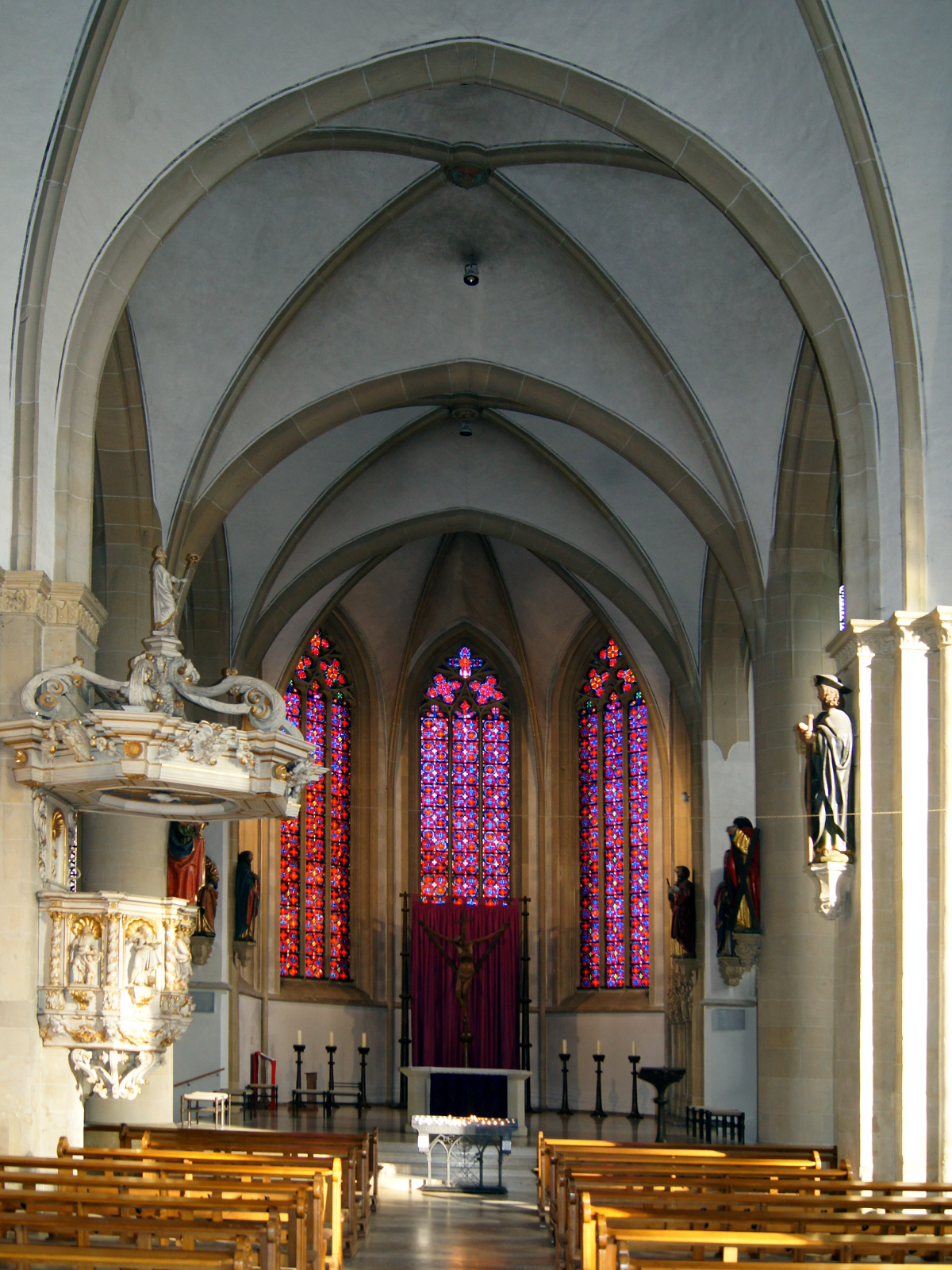 Das Mittelschiff der Coesfelder Lambertikirche. Hinter dem Altar steht im Chor das Coesfelder Kreuz, ein hölzernes Gabelkreuz aus dem frühen 14. Jahrhundert mit Kreuzreliquie, das über Jahrhunderte Gegenstand von Wallfahrten war.